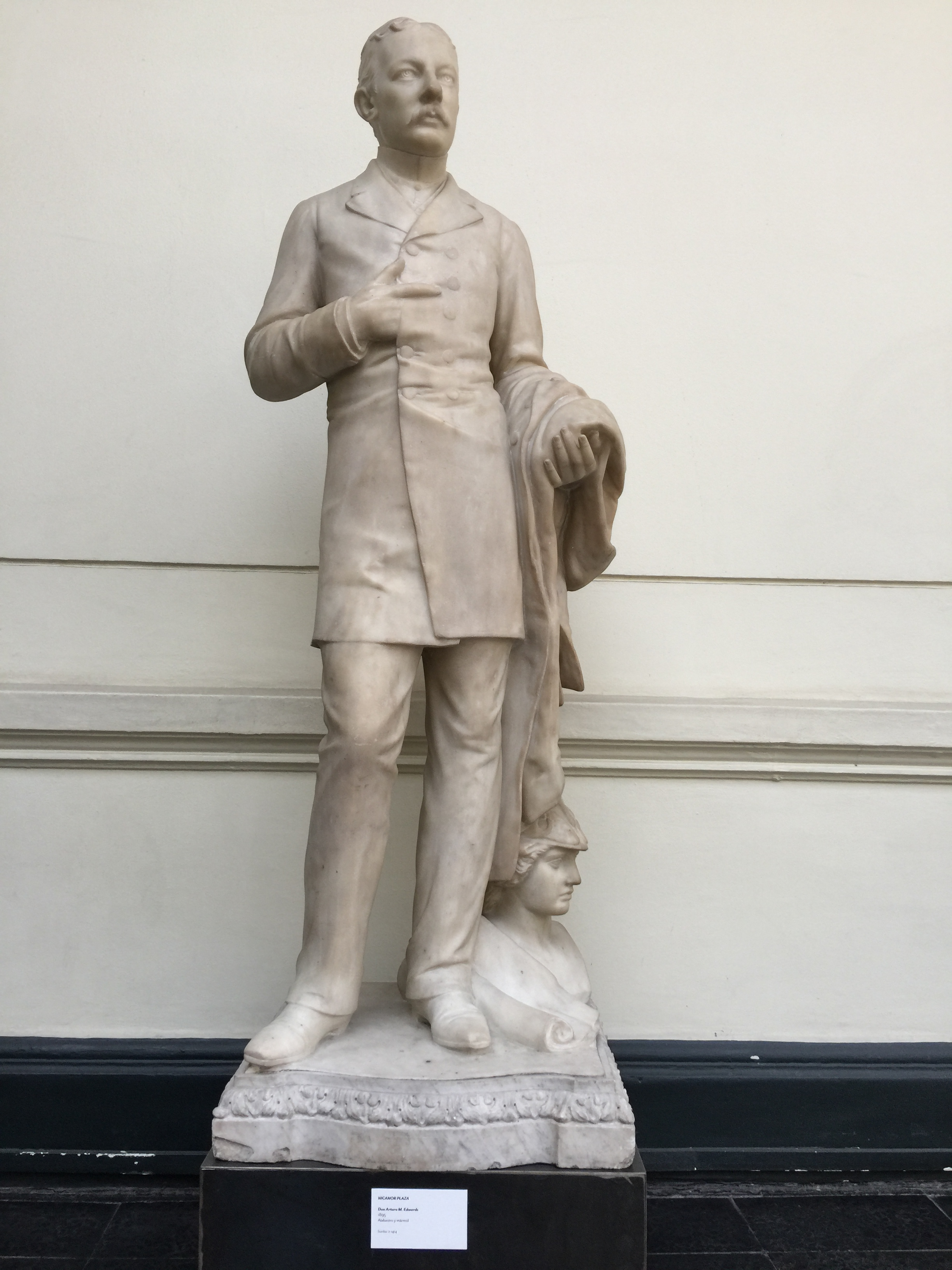 Escultura de Arturo Edwards Ross en 1888 del destaco escultor chileno, Nicanor Plaza Águila (1844 -1918).